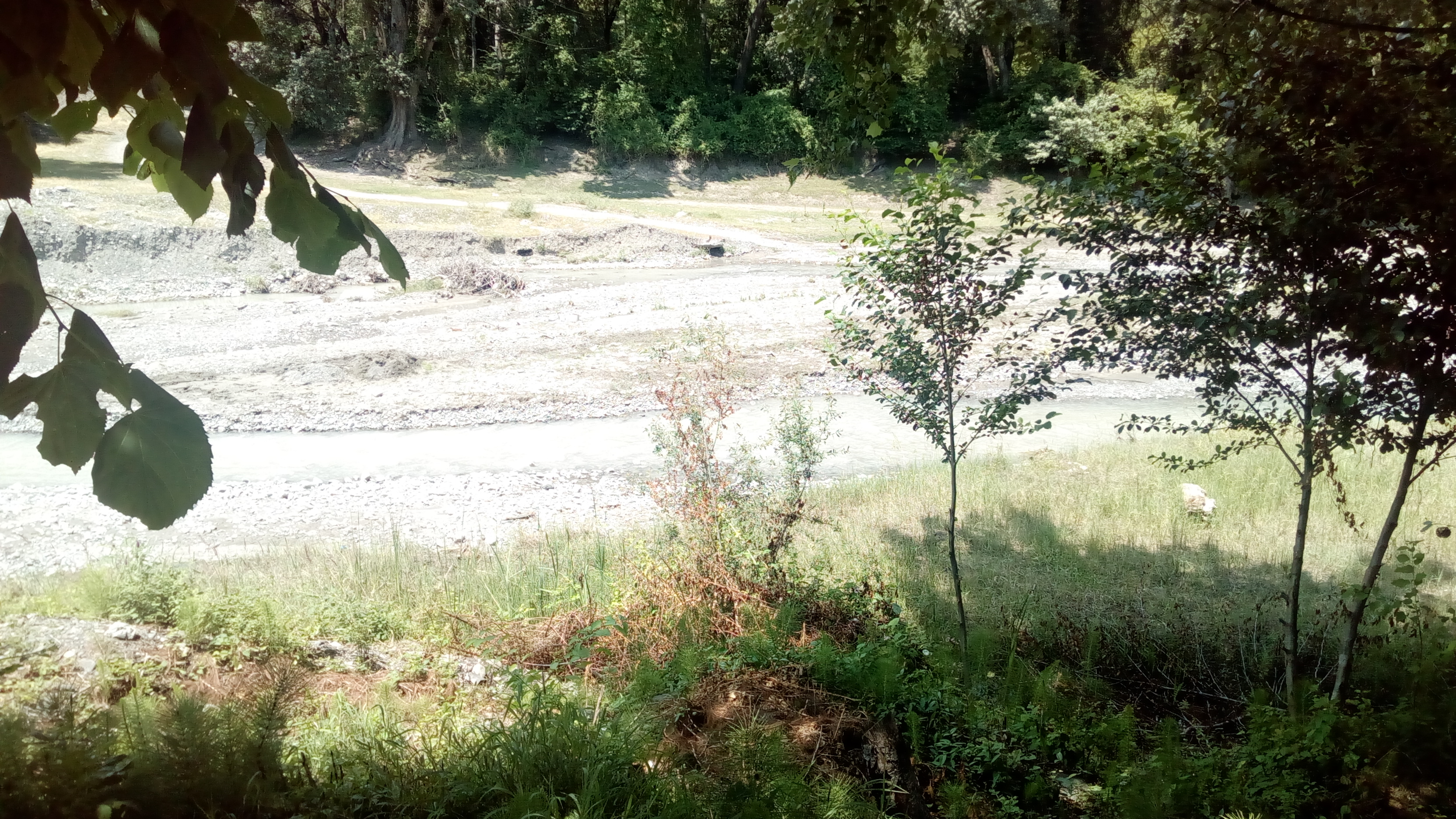 Oğuz rayonu